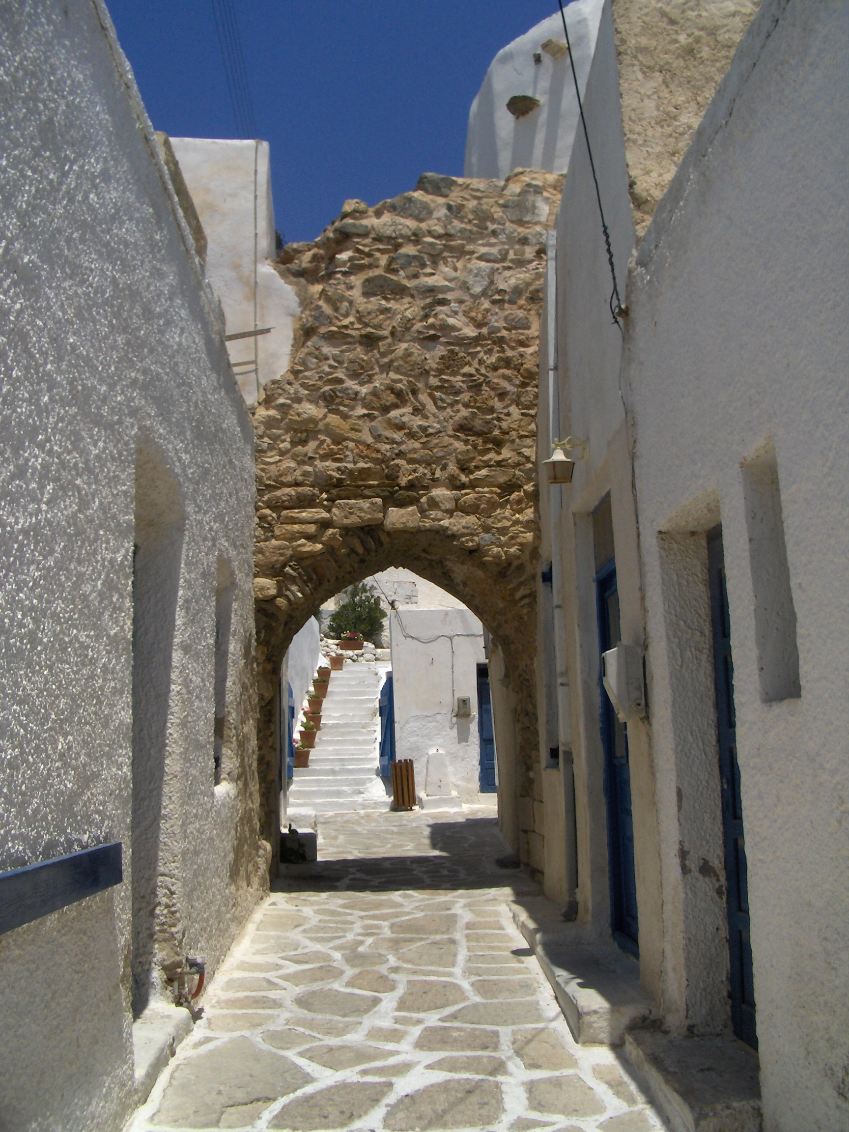 Antiparos castle